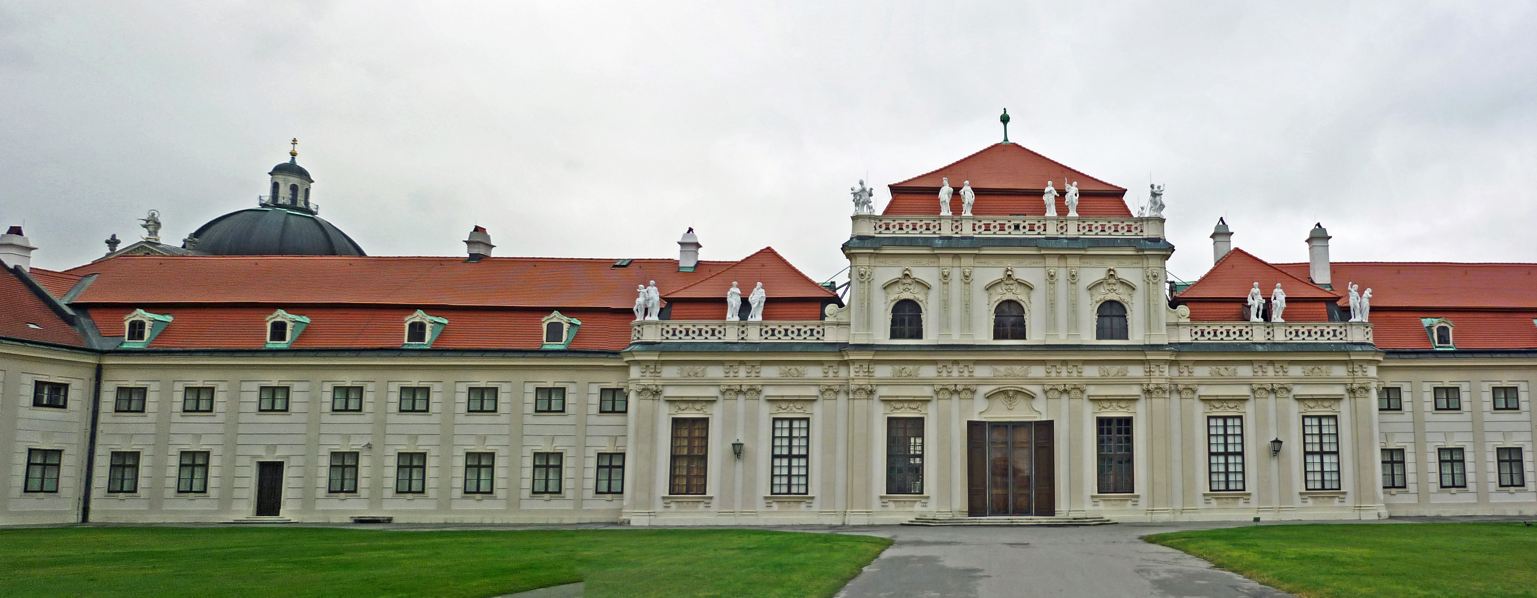 Unteres Belvedere in Wien, Straßenseite